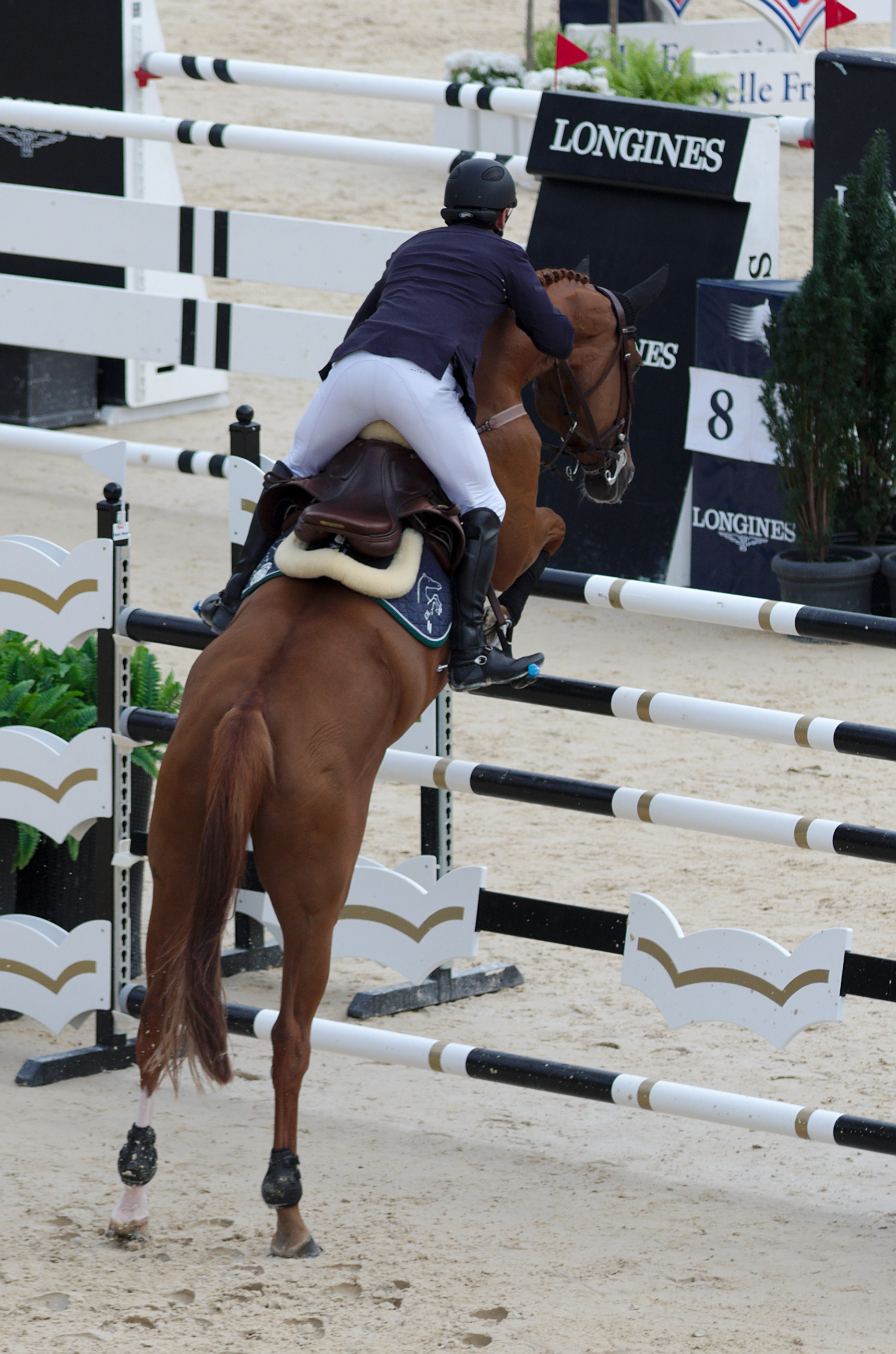 2013 Longines Global Champions - Lausanne - 14-09-2013 - Denis Lynch et Coulisa